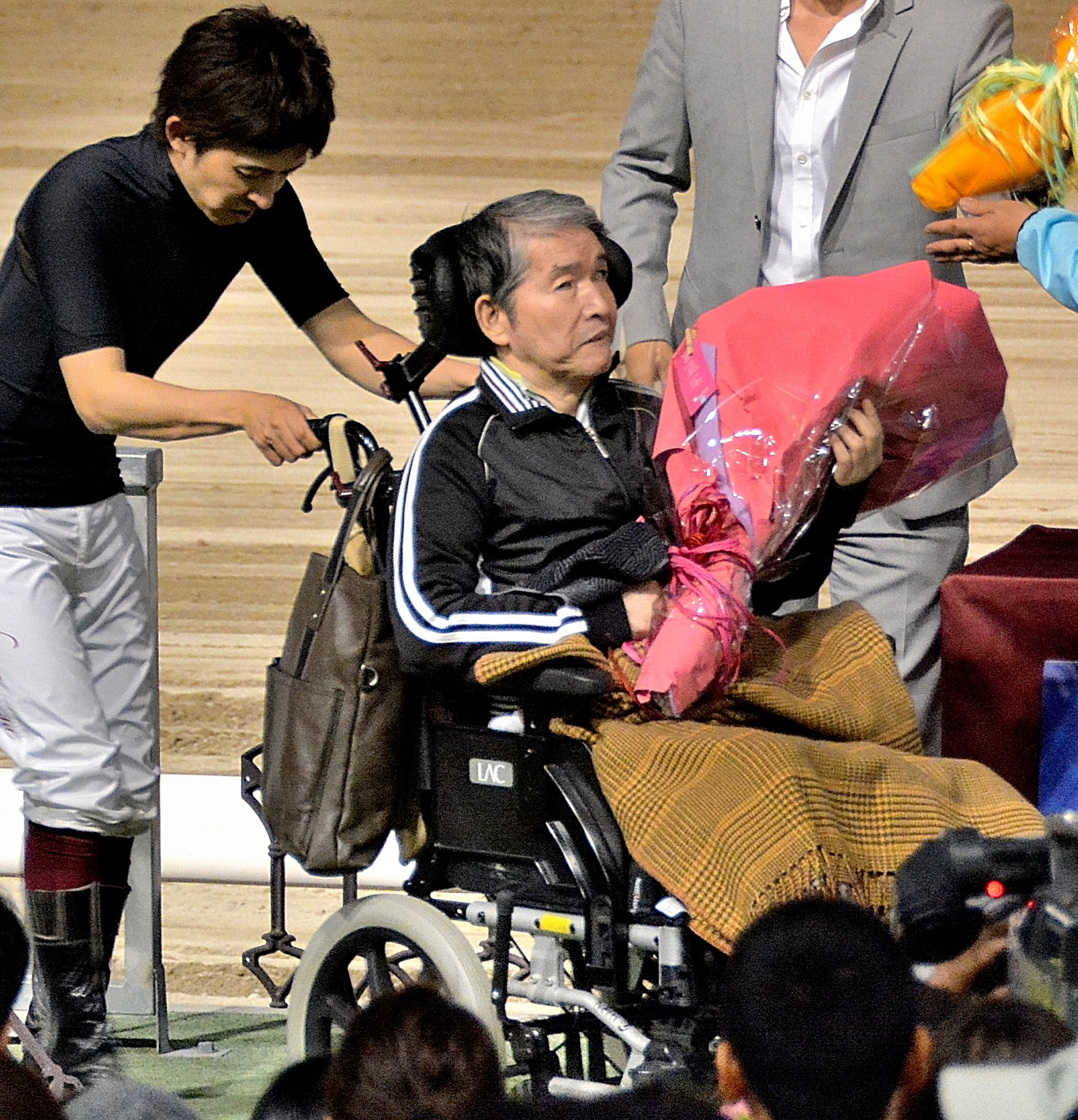 2015年4月29日に高知競馬場で行われた「第6回福永洋一記念」において、表彰式のプレゼンターを務めた福永洋一（車椅子に座っている男性）と福永祐一（車椅子を引いている男性）がイベントステージから退場してゆくところを、観客席から撮影。【注釈】このイベントの合間には競走馬は本馬場に出ておらず、日没後であった事もありフラッシュ使用モードにしております（当画像ではフラッシュ未使用）。